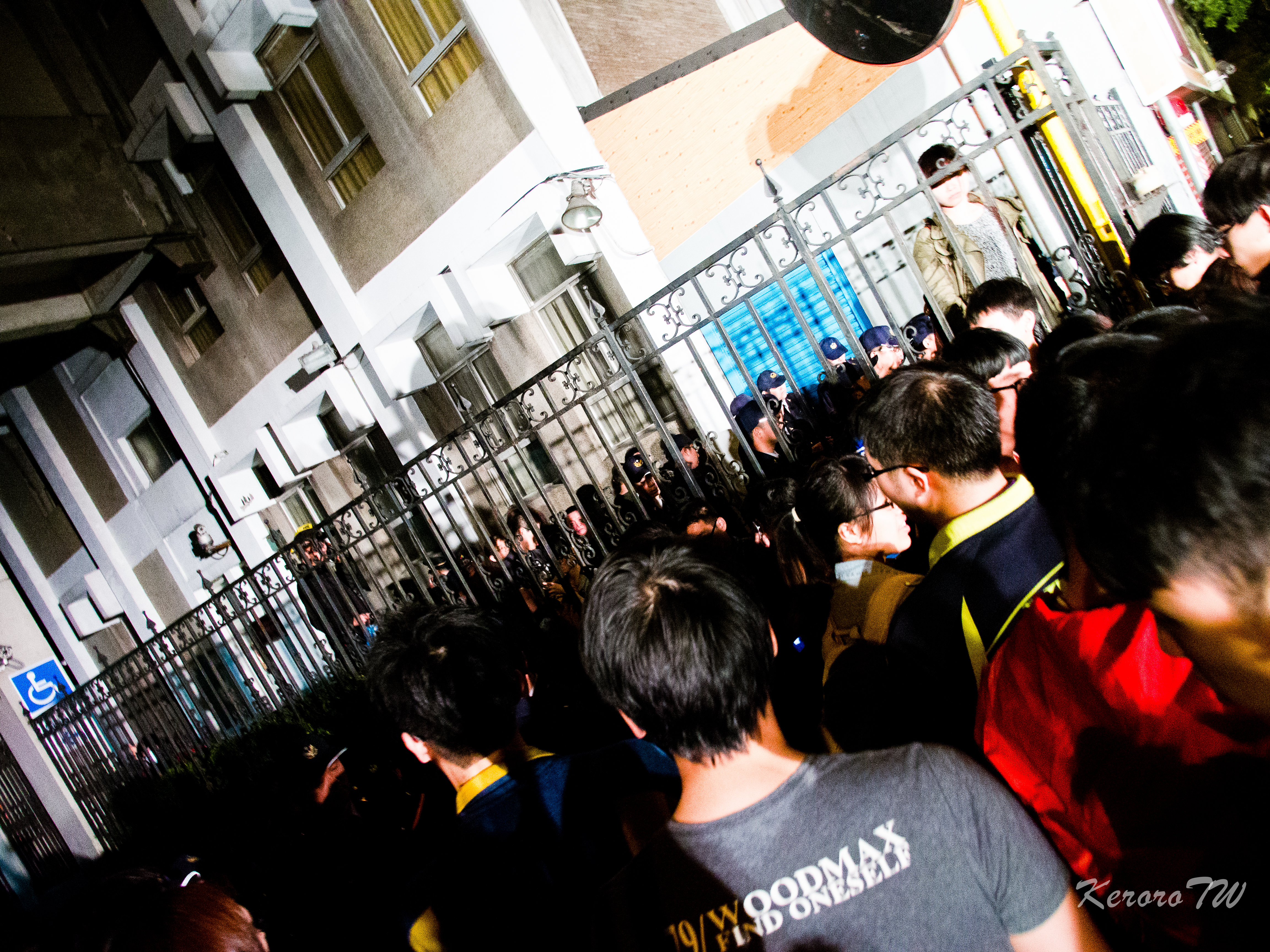 2014-03-18 反黑箱服貿